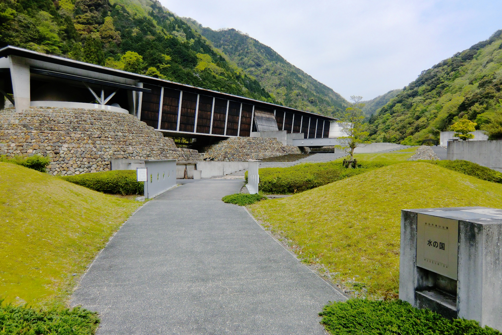 水ふれあい公園・水の国（島根県江津市）